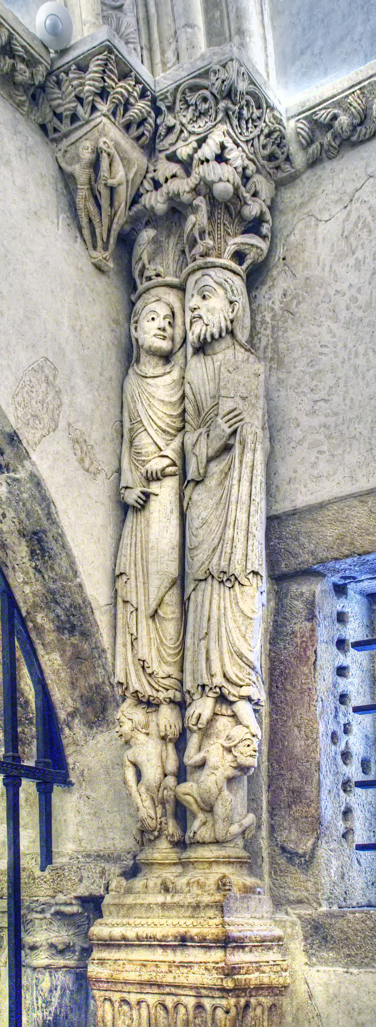 Conjunto datado en el último tercio del siglo XII, cuando se reformó la antigua capilla cubriéndola con una bóveda de cañón, entre otros cambios. La bóveda se soporta por tres arcos bajo los cuales están los seis conjuntos de parejas de apóstoles.